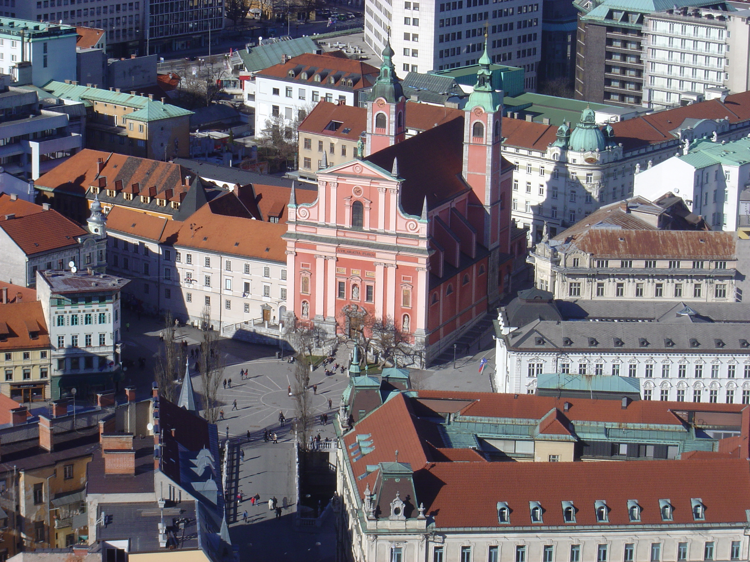 Ljubljana, Slovenia